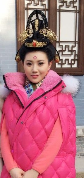 侯梦瑶在横店影视城的合影